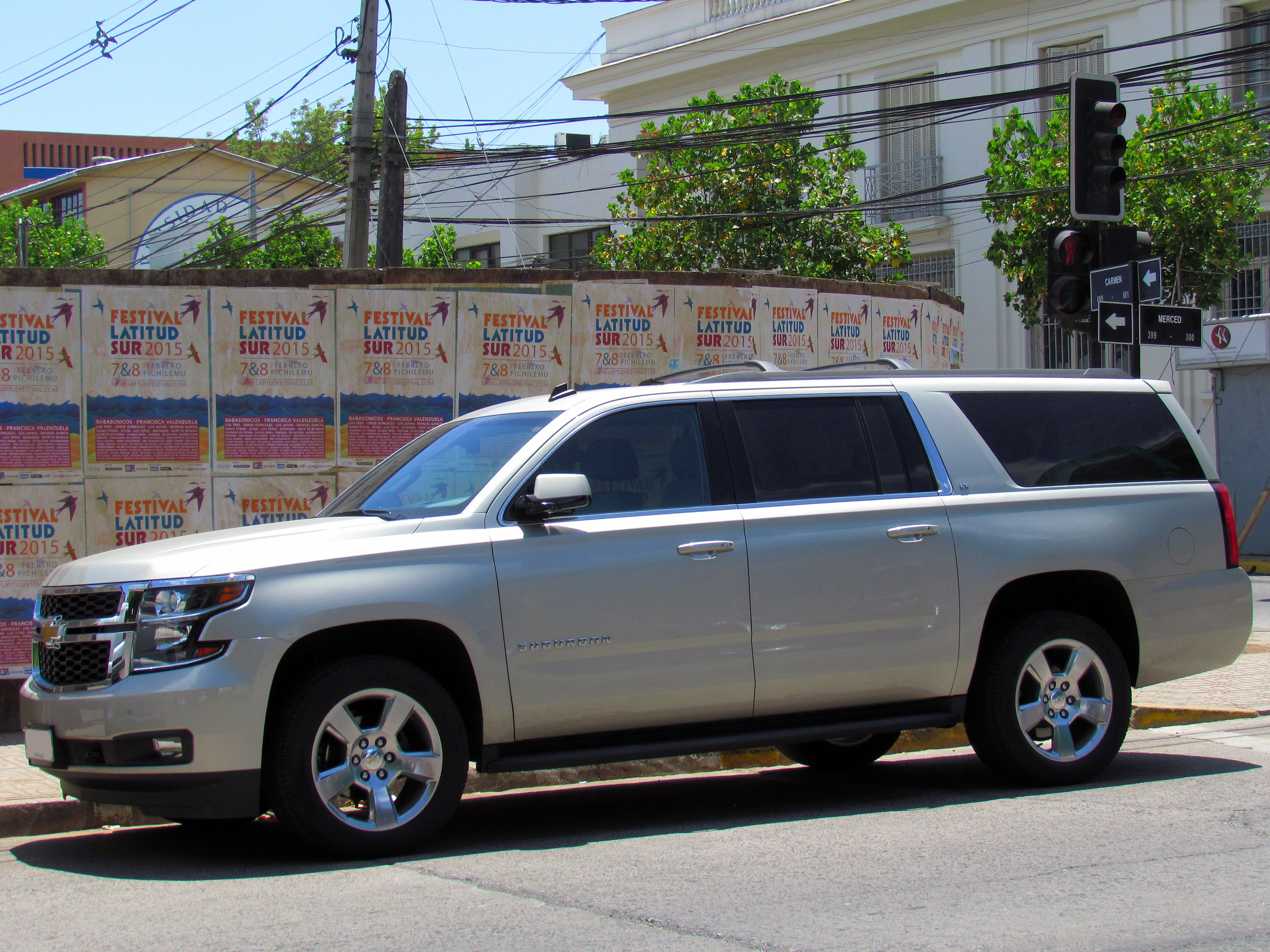 Chevrolet Suburban LT 2015